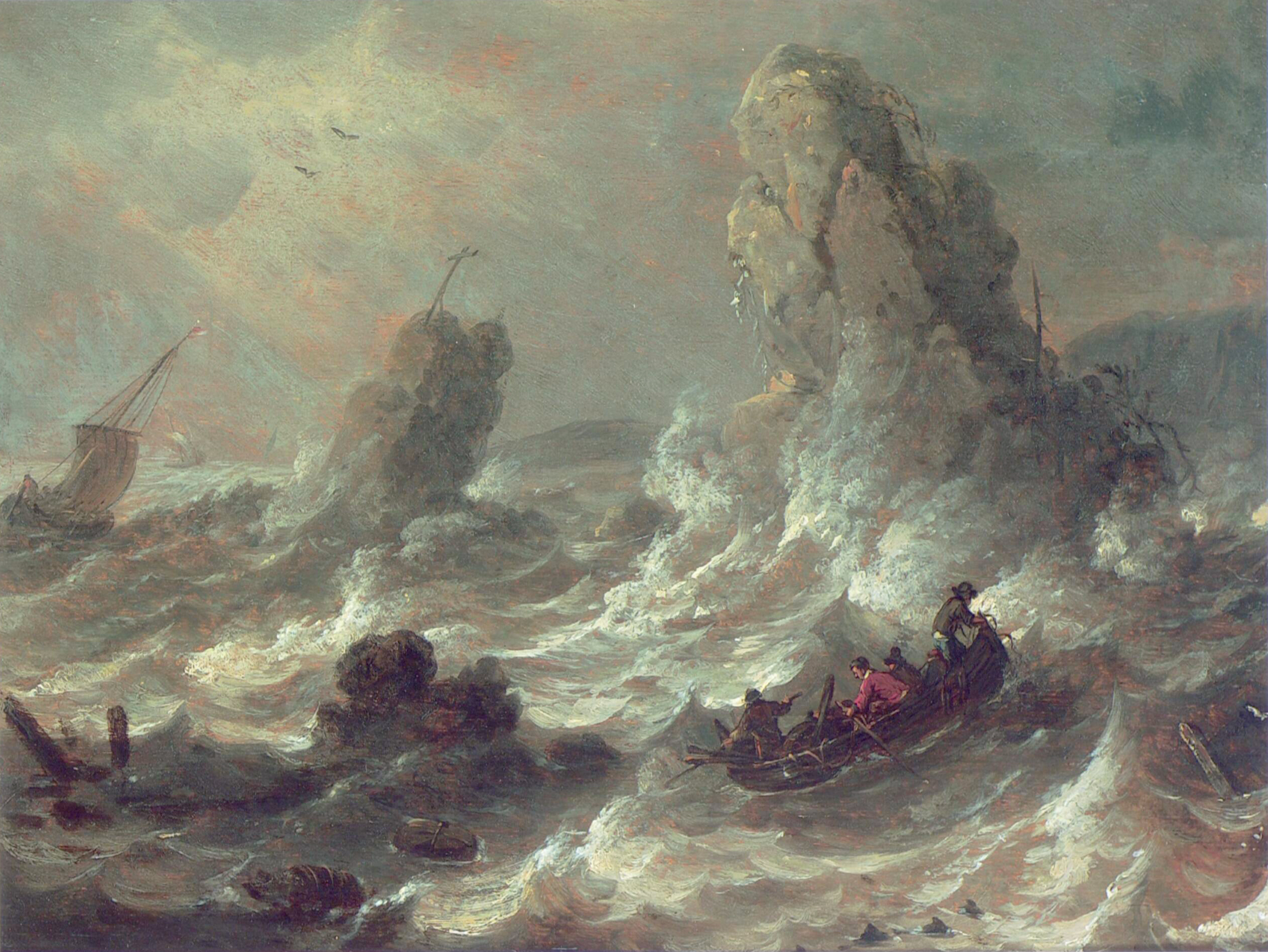 Stormachtige zee met enkele boten bij rotsen (Stormy sea with some boats nearby clifs)